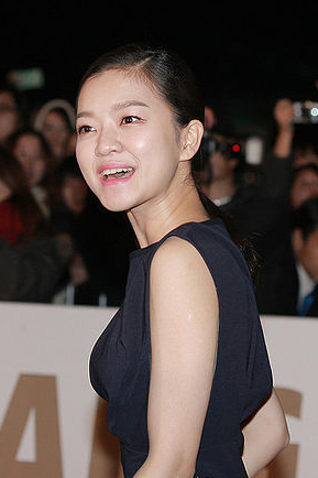 제34회 청룡영화상